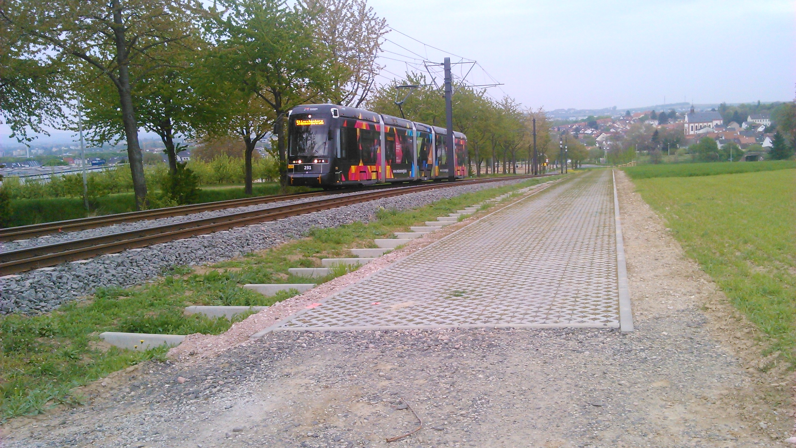 Straßenbahn der Linie 51 Richtung Mainz-Lerchenberg auf dem Marienborner Bergweg, April 2017. Im Hintergrund Marienborn mit Wallfahrtskirche St. Stephan.